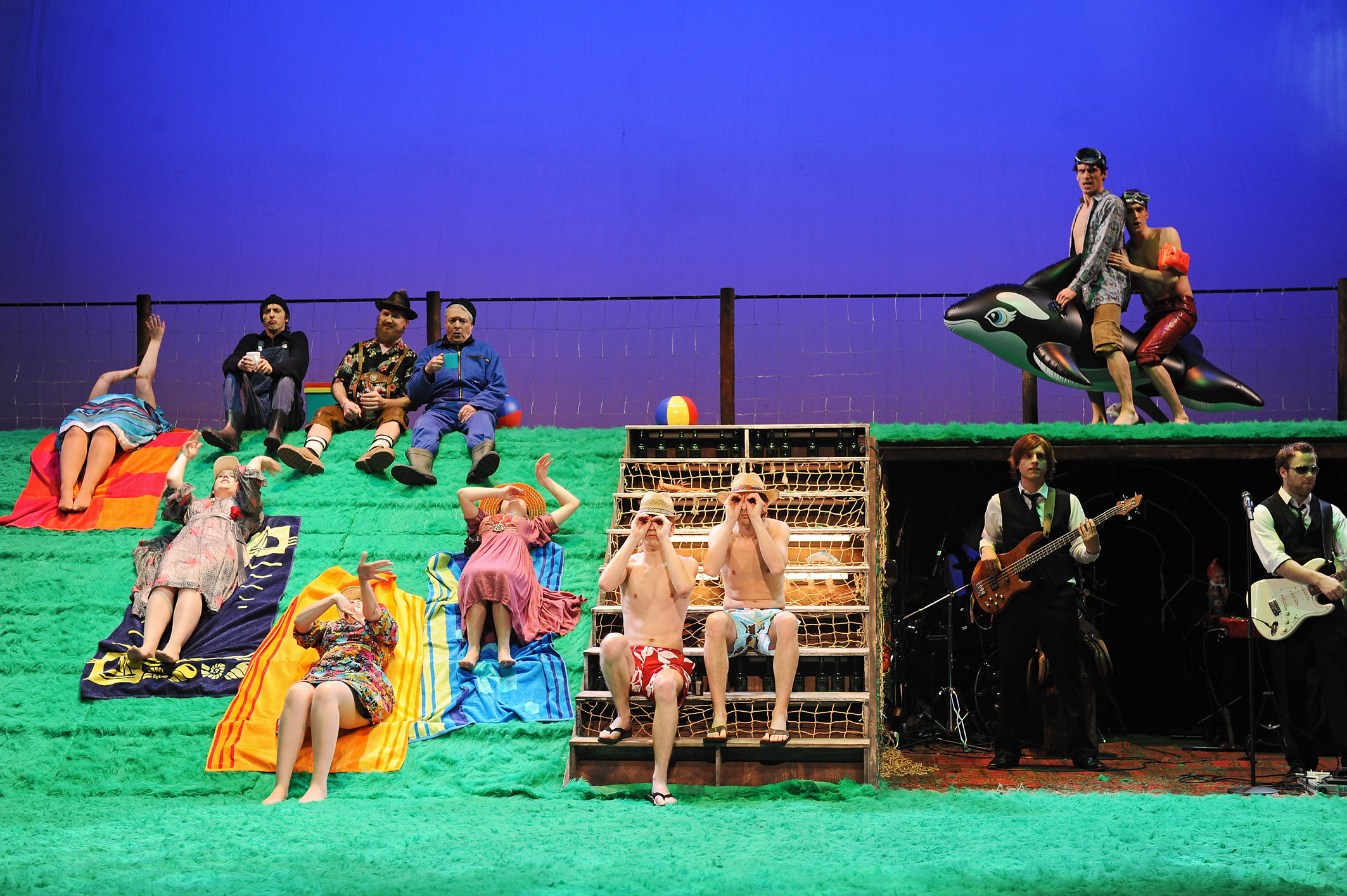 Musical "Meta, Norddeich" Landesbühne Niedersachsen Nord